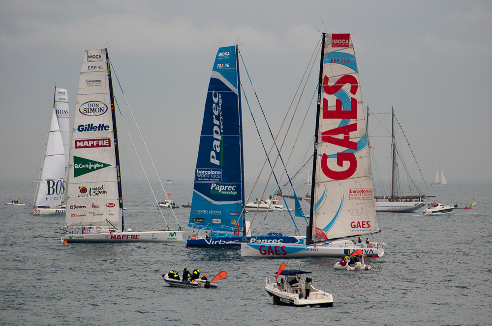 Todas las fotos se pueden ver en: Salida Barcelona World Race 2010-2011